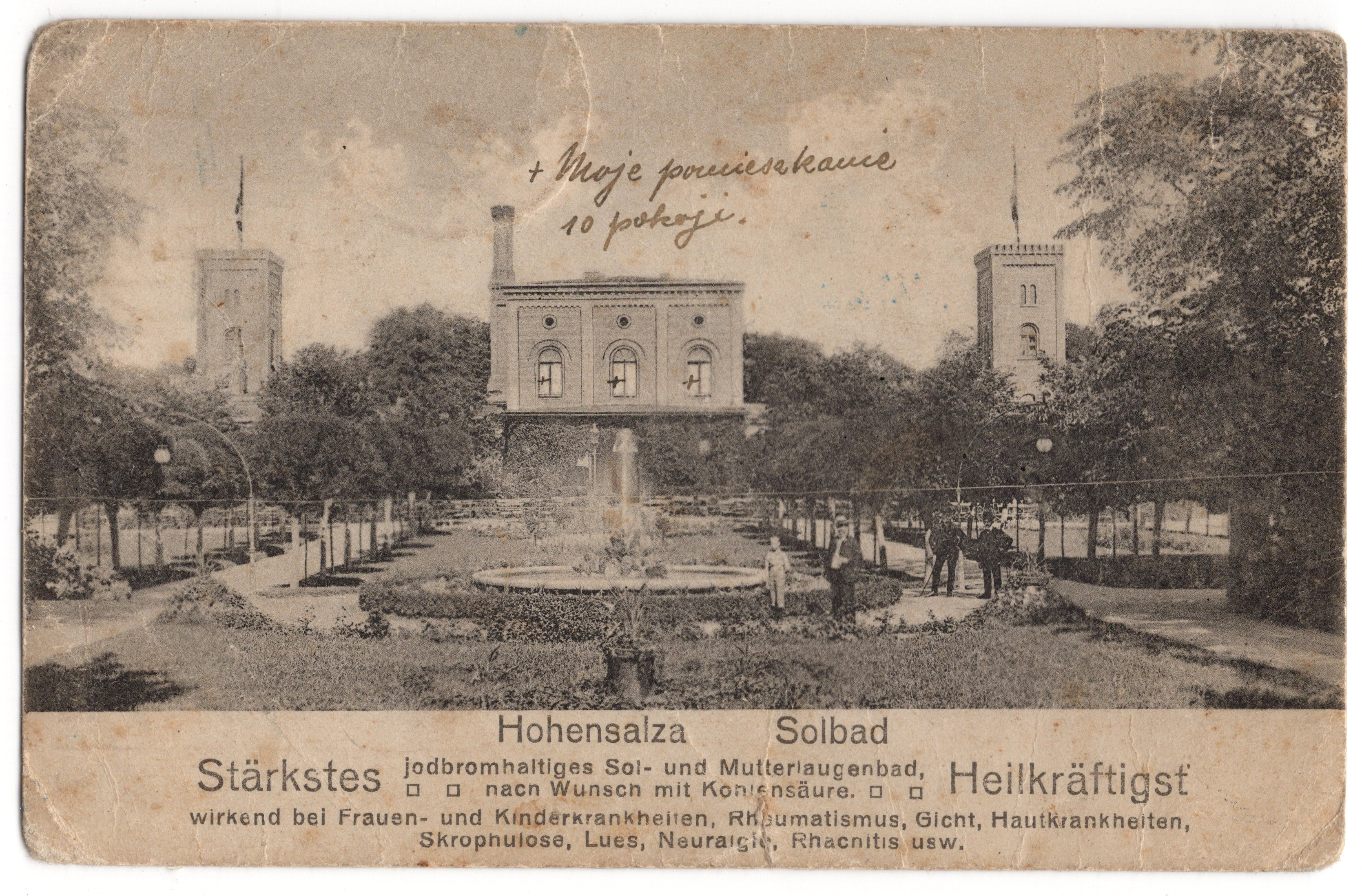 Pocztówka wysłana 8.04.1922 roku z Inowrocławia przez Walentego Kortusa do brata Jana Kortusa, mieszkającego w Buku. W latach 1923-1936 pełnił on funkcję dyrektora Miejskich Zakładów Zdrojowych i przyczynił się dynamicznego rozwoju uzdrowiska. Na odwrocie pocztówki napisał m.in.: "Z mego nowego stanowiska przesyłam wszystkiem moje najserdeczniejsze pozdrowienia. (...) Teraz wszystkich zapraszam na odpoczynek do wód!"